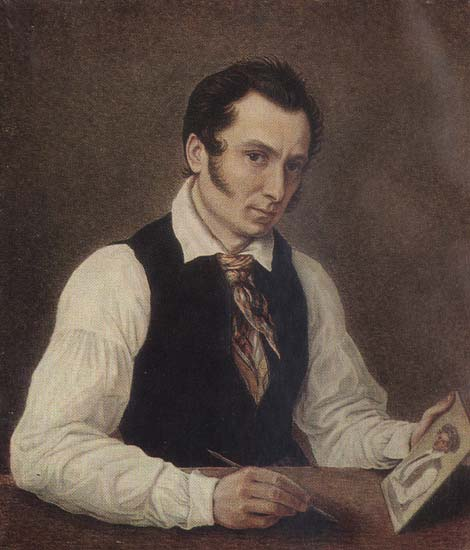 Автопортрет художника за работой над портретом брата М. А. Бестужева